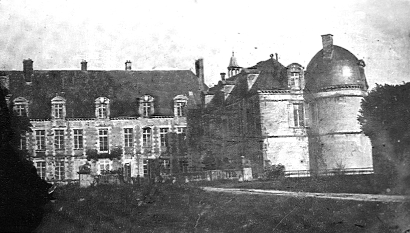 Le château d'Etoges en 1880